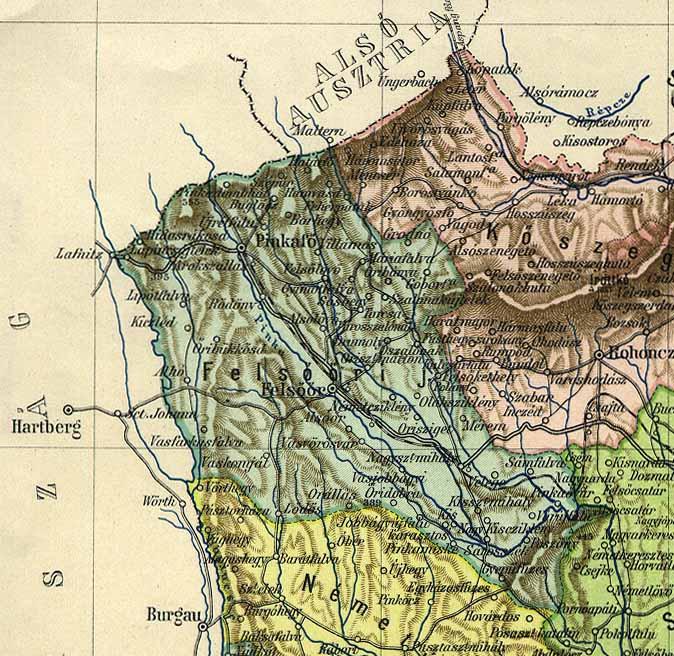 Stuhlbezirk Oberwart (Felsöör) im Komitat Eisenburg (Vas), Ungarn, 1910. Felsöör = Oberwart, Pinkafö = Pinkafeld